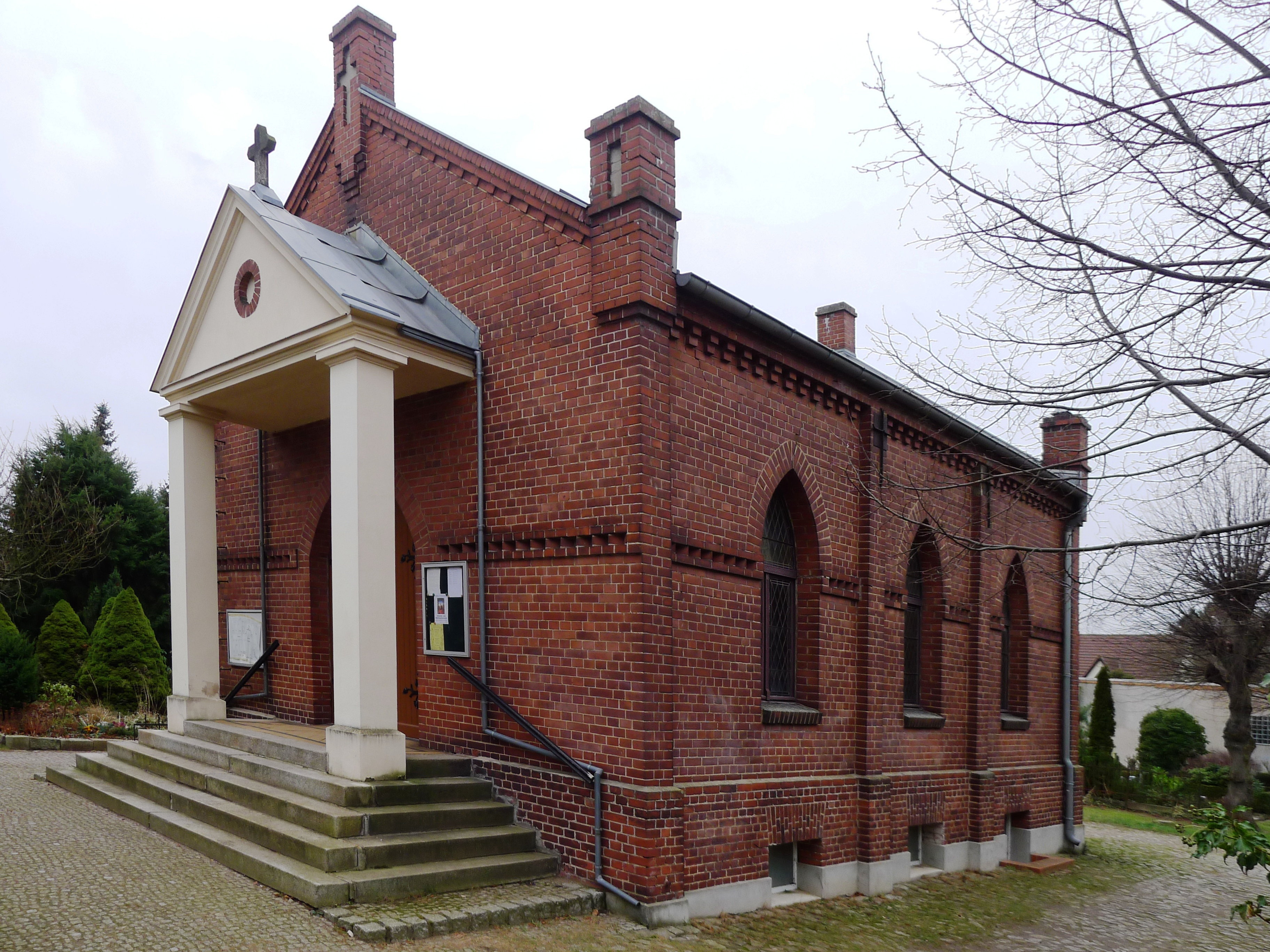 2009 wurde die Kapelle nach Werner Sylten benannt